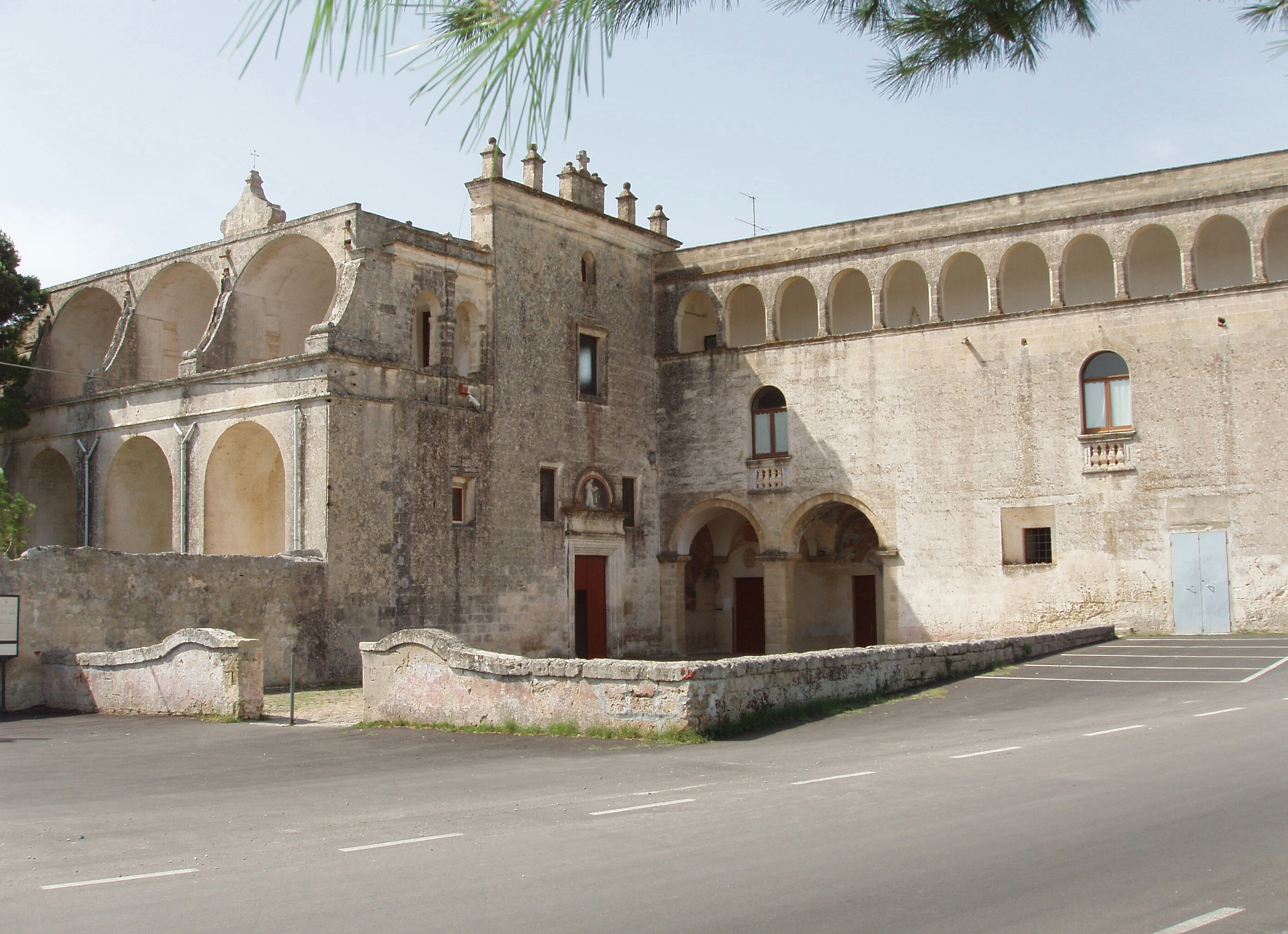 chiesa e convento di S. Francesco - Castellaneta